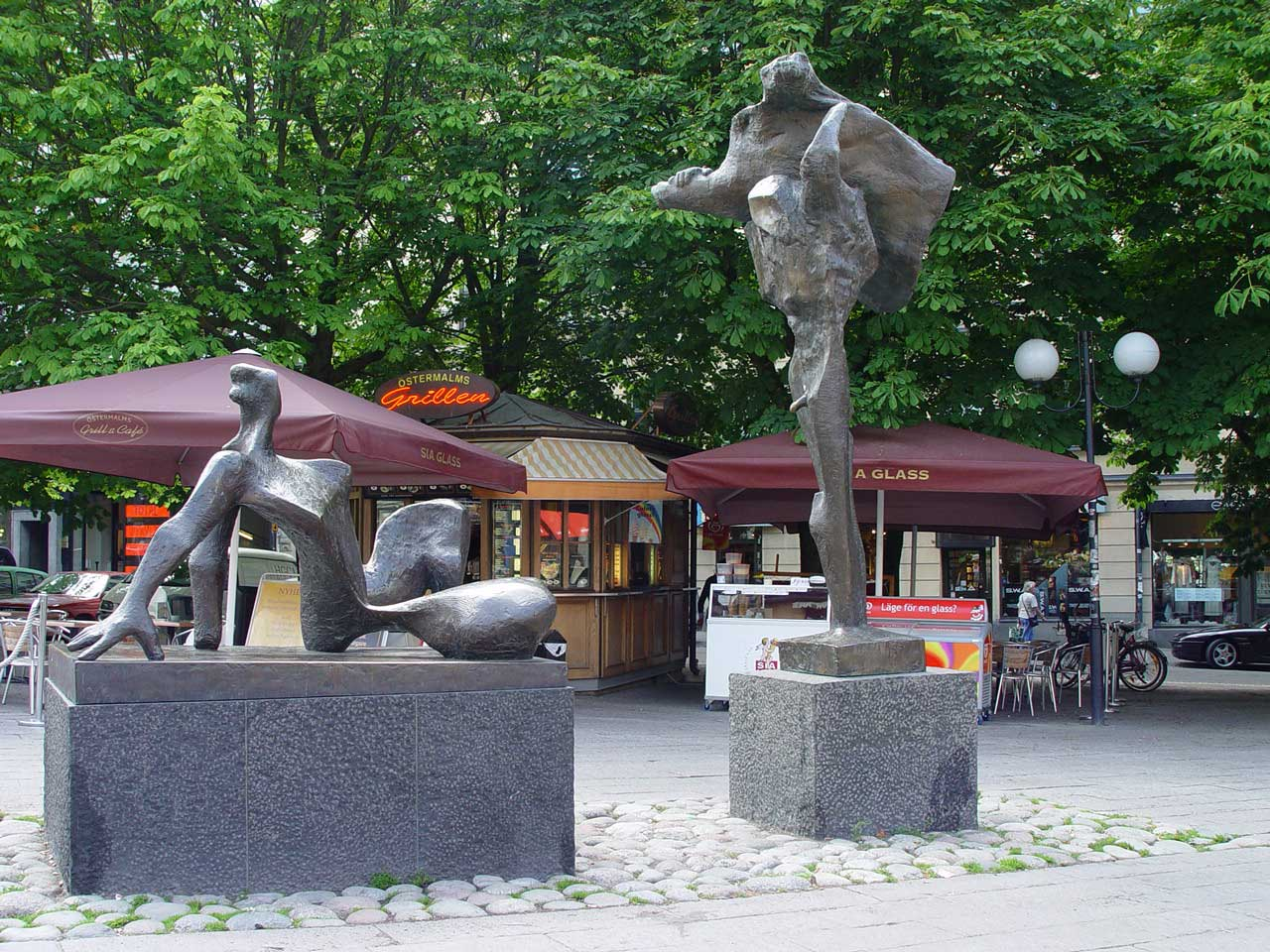 Skulpturengruppe "Möte" von Willy Gordon auf dem Östermalmstorg (Stockholm)